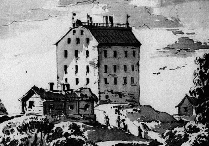 Bogesunds slott i Jean Eric Rehns version